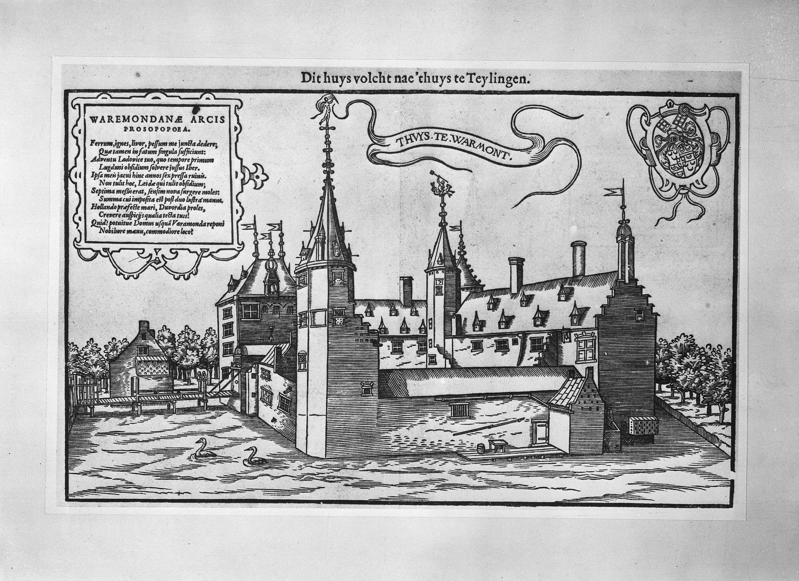 Kasteel Warmond: Kasteel naar houtsnede/gravure (opmerking: Reproductie uit: Goris, G.: Les delices de la campagne a l’entour de la ville de Leide, p. 143)